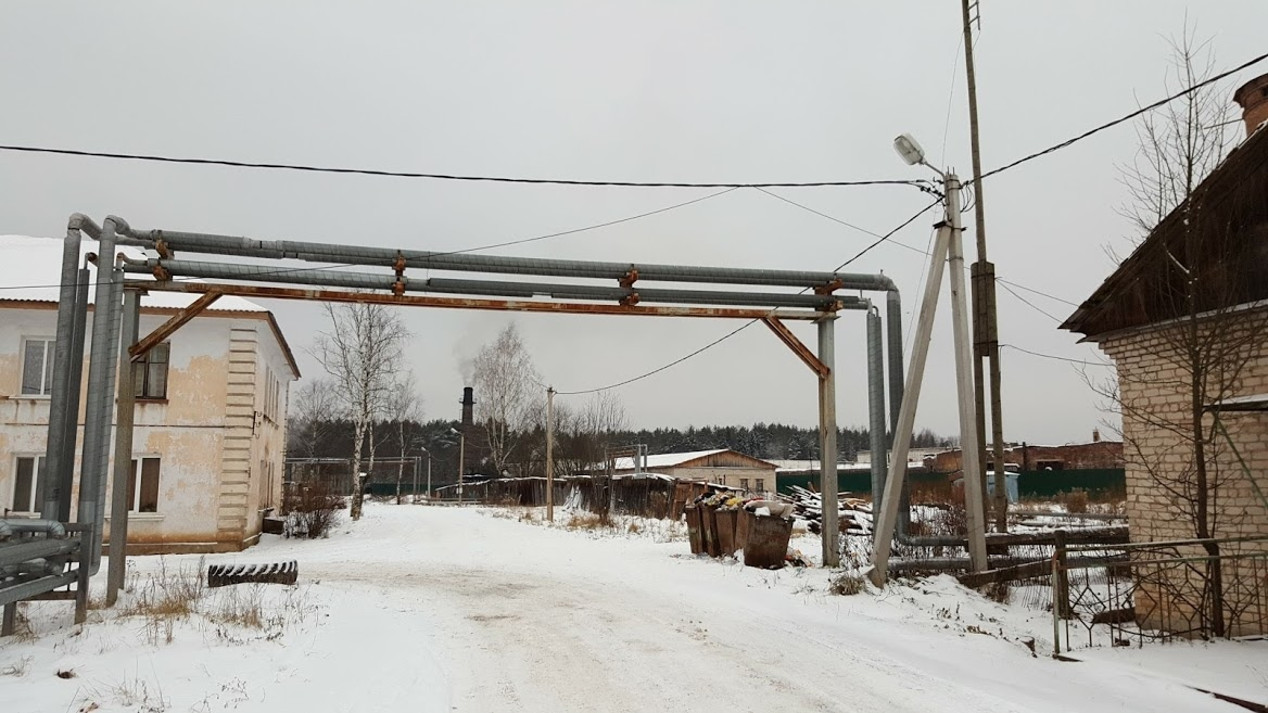 Неоформленные теплосети бывшей колонии